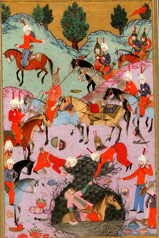 Secaatname 0277